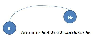 Un arc de surclassement